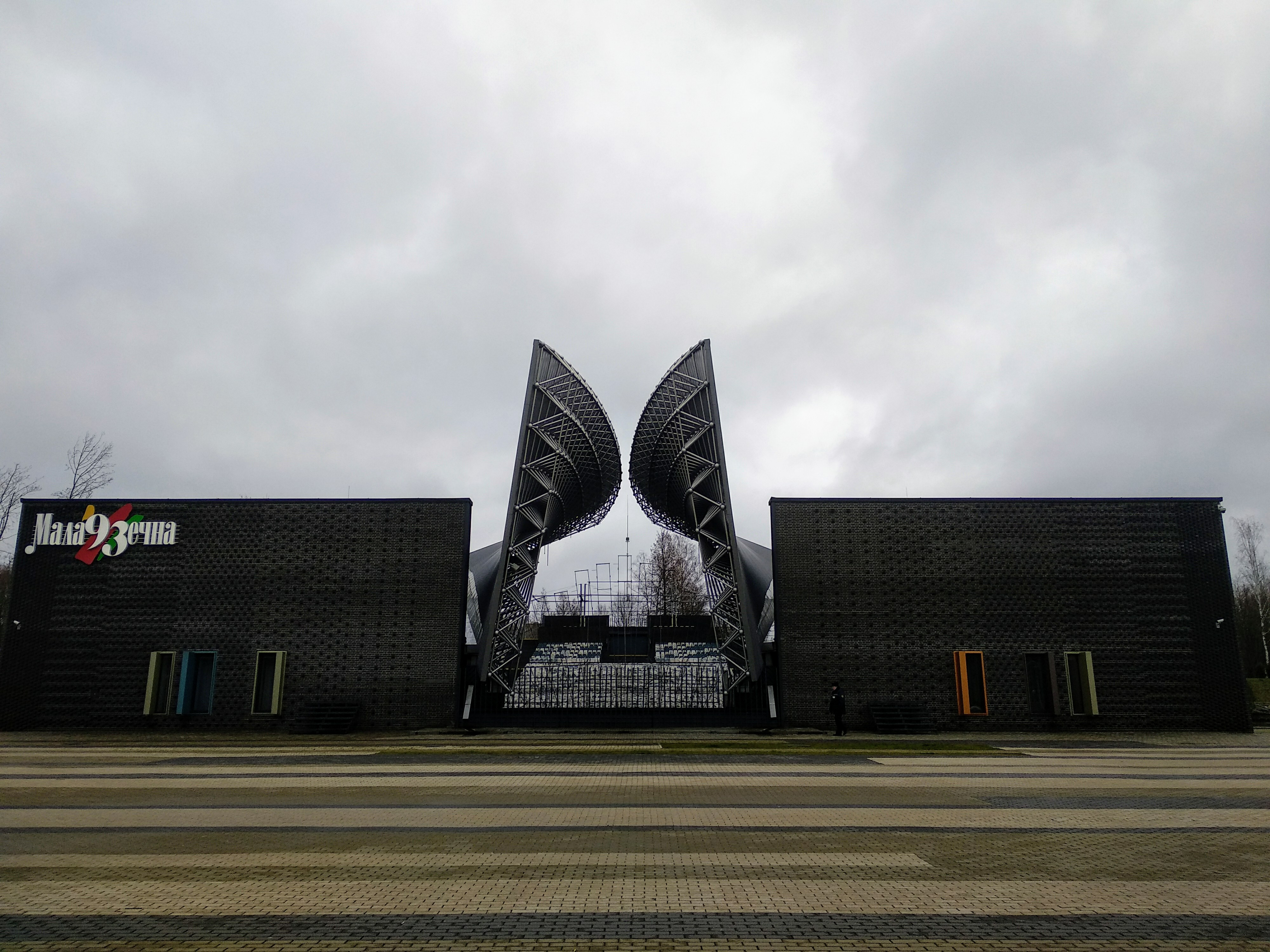 Maladzechna, Belarus